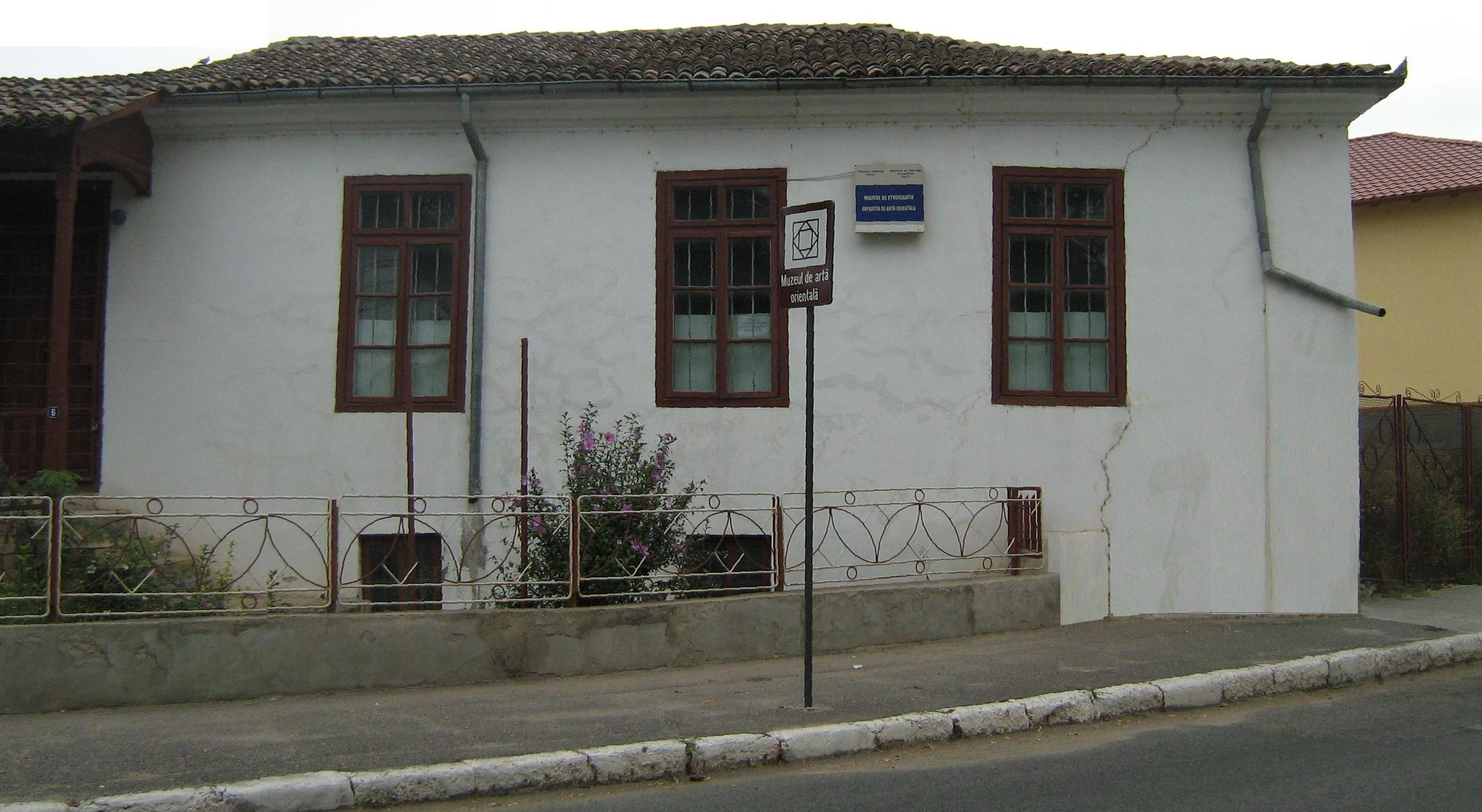 Casa " Panaghia", azi Muzeul de artă orientală